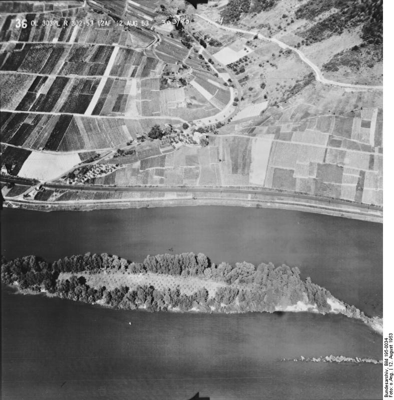 Rheinbefliegung der Alliierten 1953 Information added by Wikimedia users. Kleine Lorcher Werth und Bächergrund bei Lorch